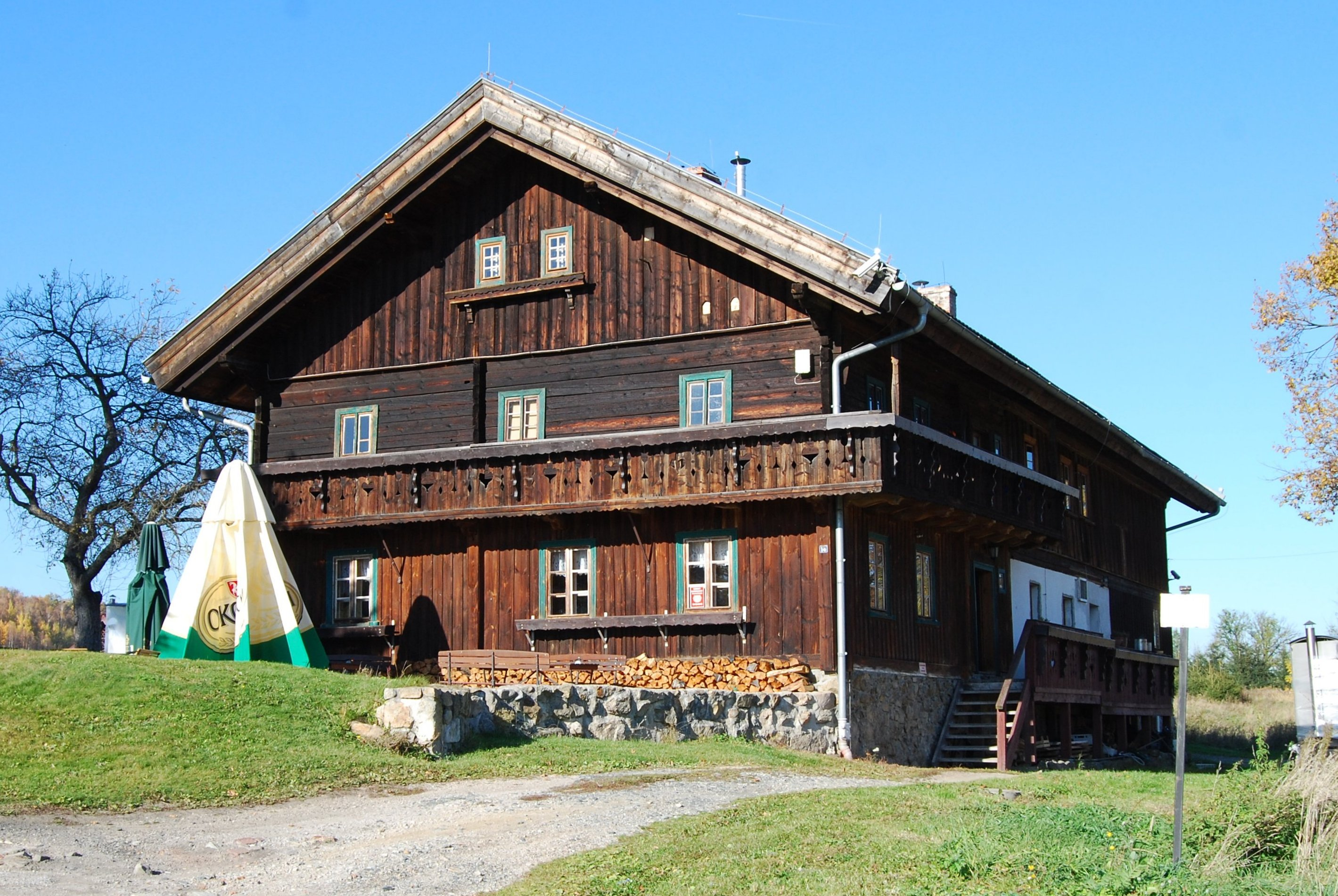 Mysłakowice, ul. Starowiejska 14 - budynek mieszkalno-gospodarczy (dom tyrolski z 1838 r.). Obecnie restauracja "Dom tyrolski"